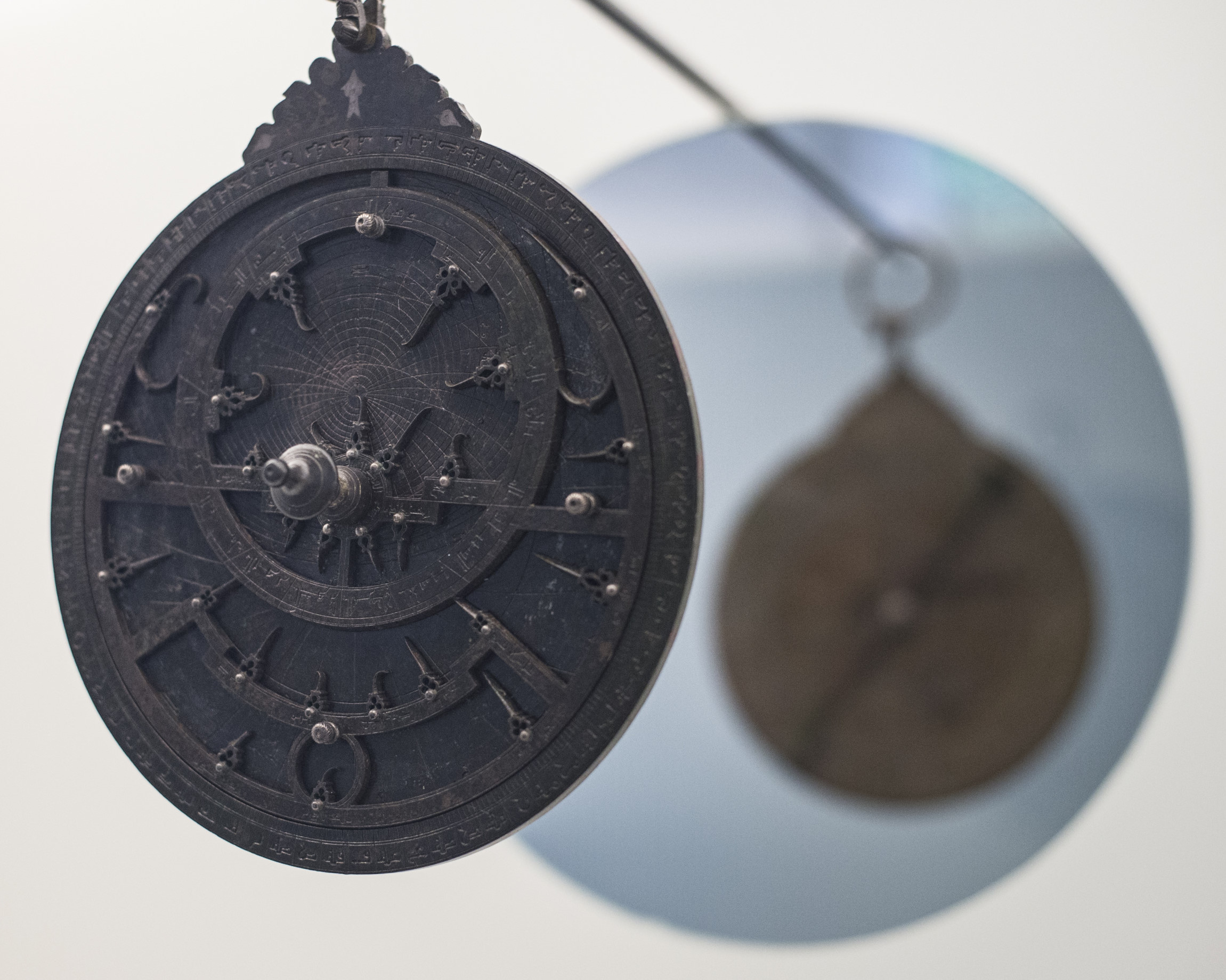 Astrolabio. Ibn Zawal 1481. Bronce fundido. Procedencia: Albaicín, Granada. Fotos: J.M.Grimaldi / Junta de Andalucía Museo Arqueológico y Etnológico de Granada, Spain.